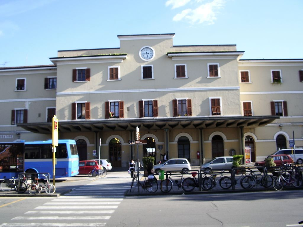 Facciata della Stazione FS di Empoli